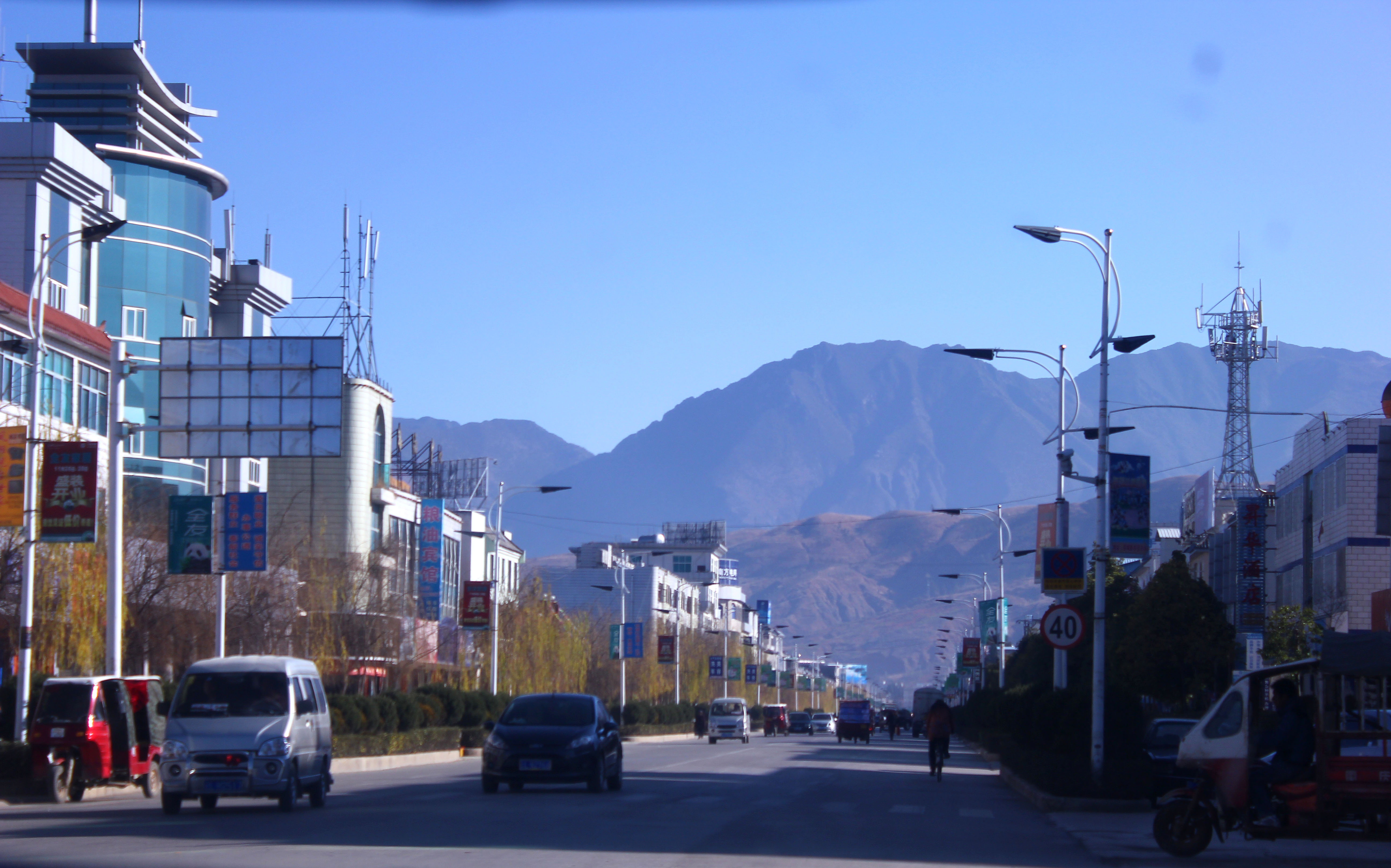 云南大理州洱源县县城